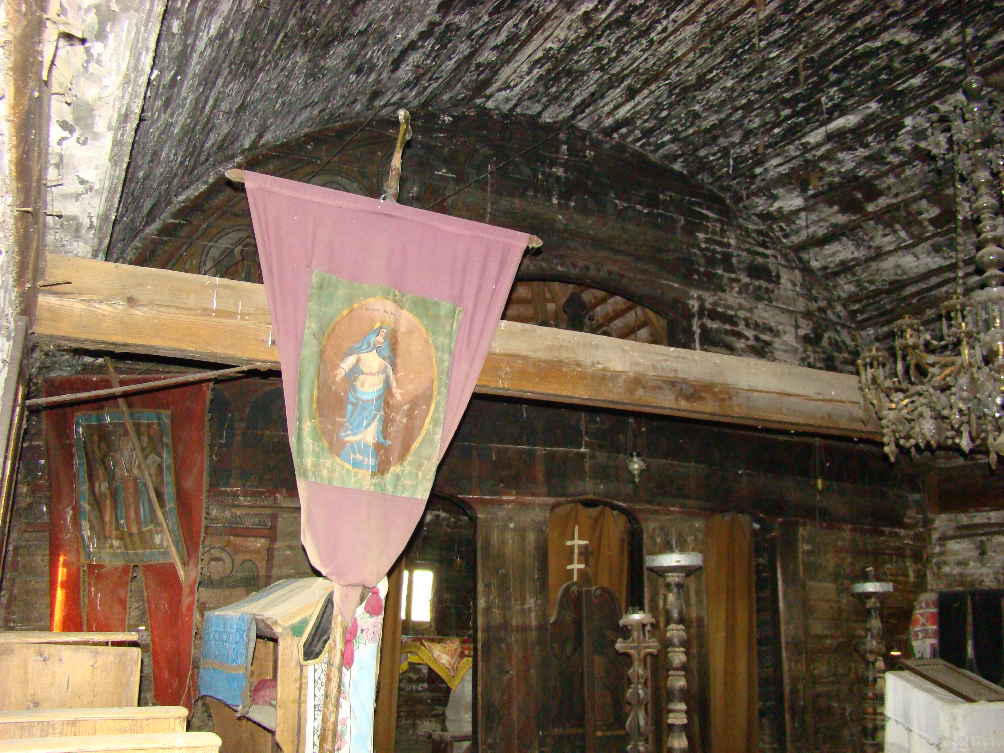 Biserica de lemn din Tău